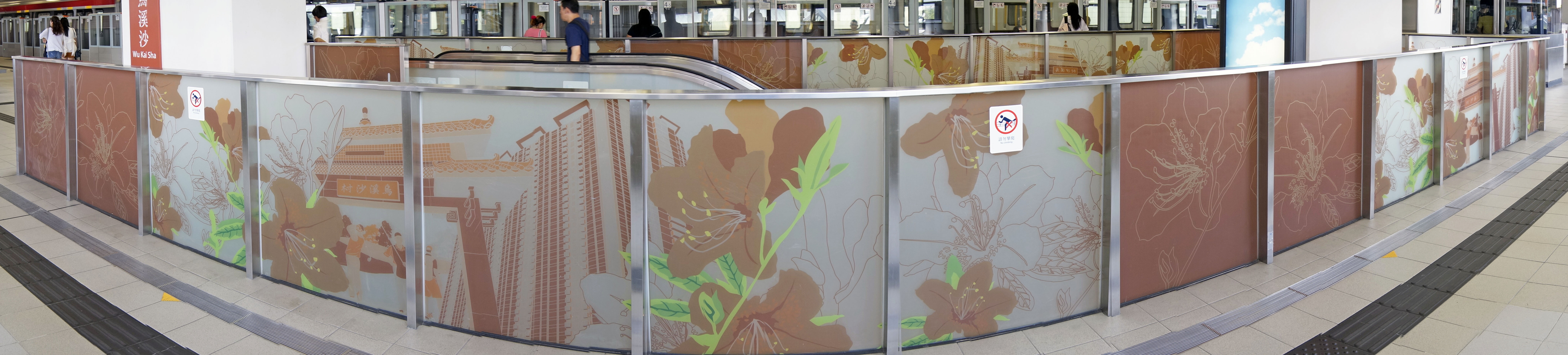 港鐵烏溪沙站月台佈置全景圖